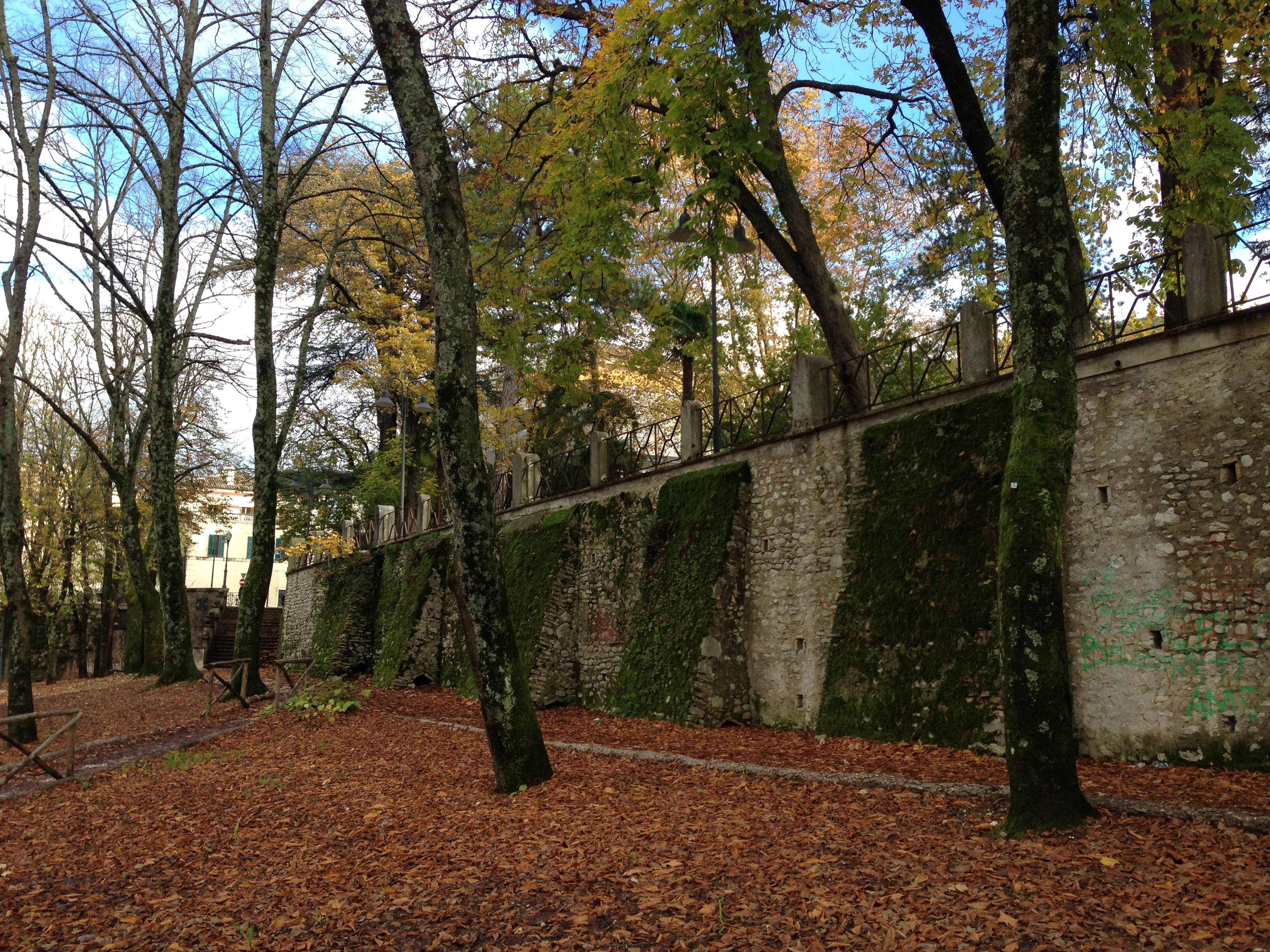 Parco Chico Mendez. Sotto la Casina dell'ippocastano. Spoleto